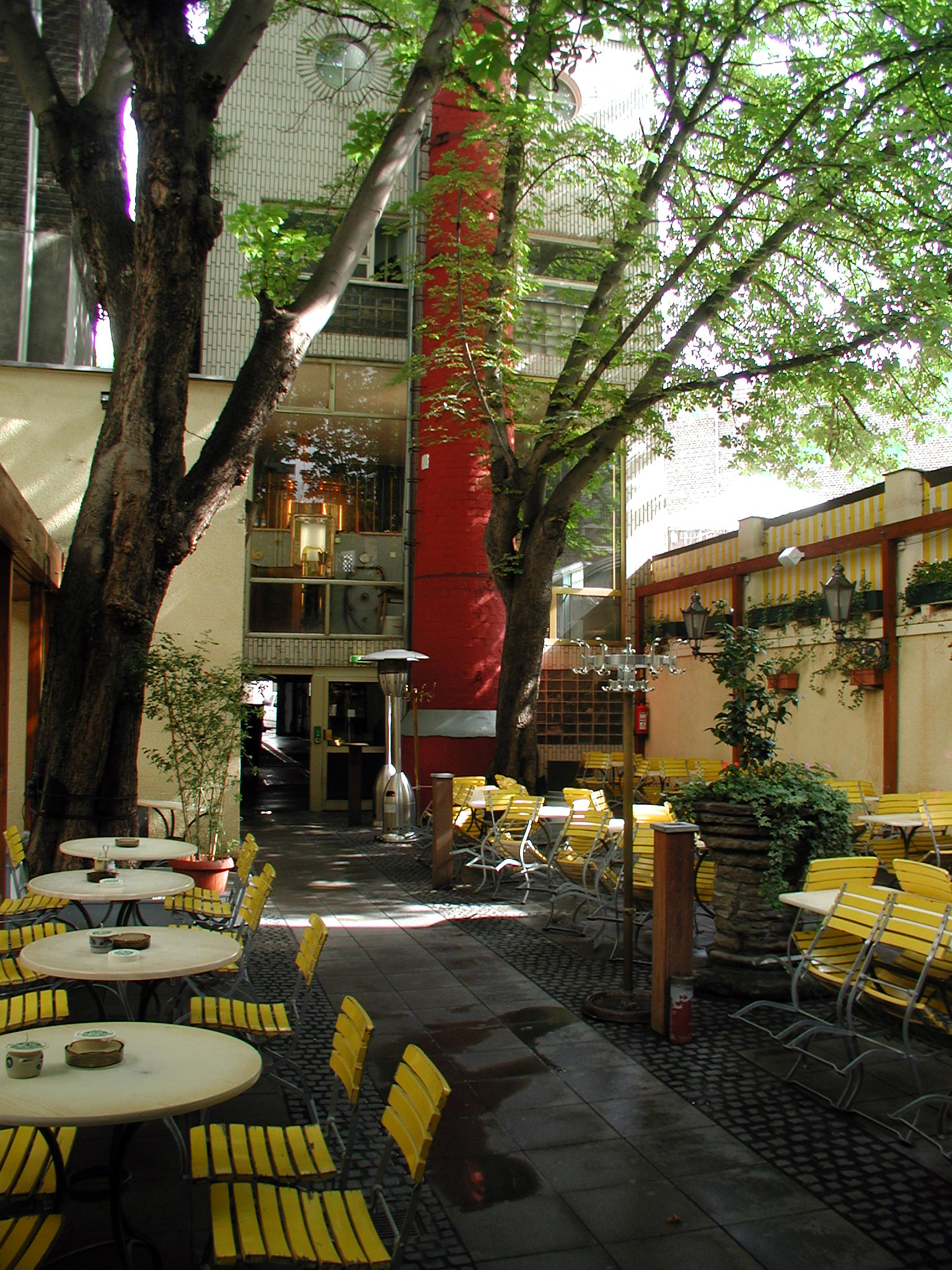 Hausbrauerei-Päffgen, Köln